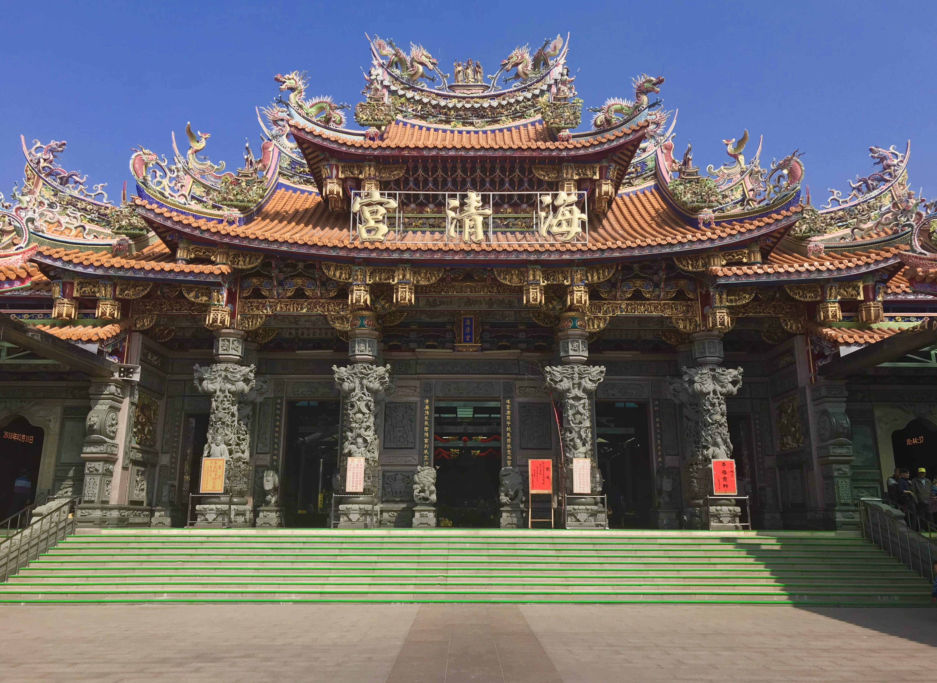 三條崙海清宮正面照